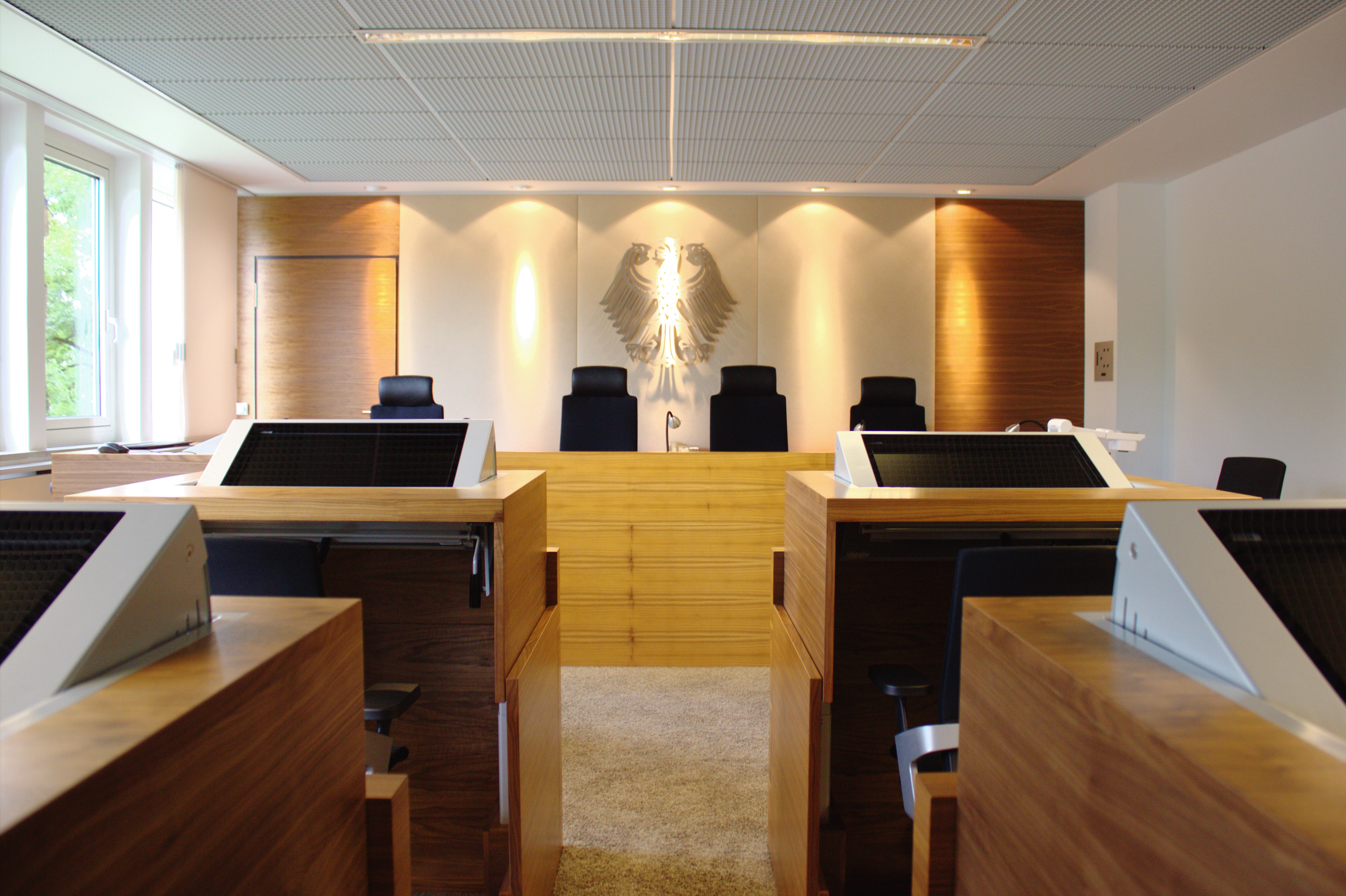 Das Bundespatentgericht in München. Fotografiert im Rahmen des Landtagsprojektes Bayern 2012. Wikipedia im Landtag – Bayern 17. bis 19. Juli 2012 in München Dieses Foto wurde im Rahmen des Projektes „Wikipedia im Landtag“ erstellt.